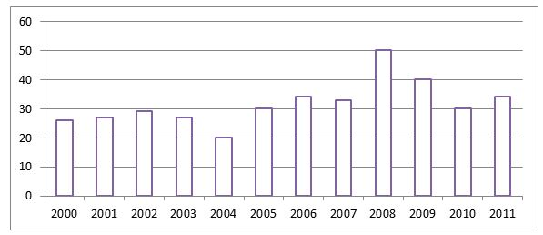 Születések számának változása Csongoron 2000-2011 között (fő)